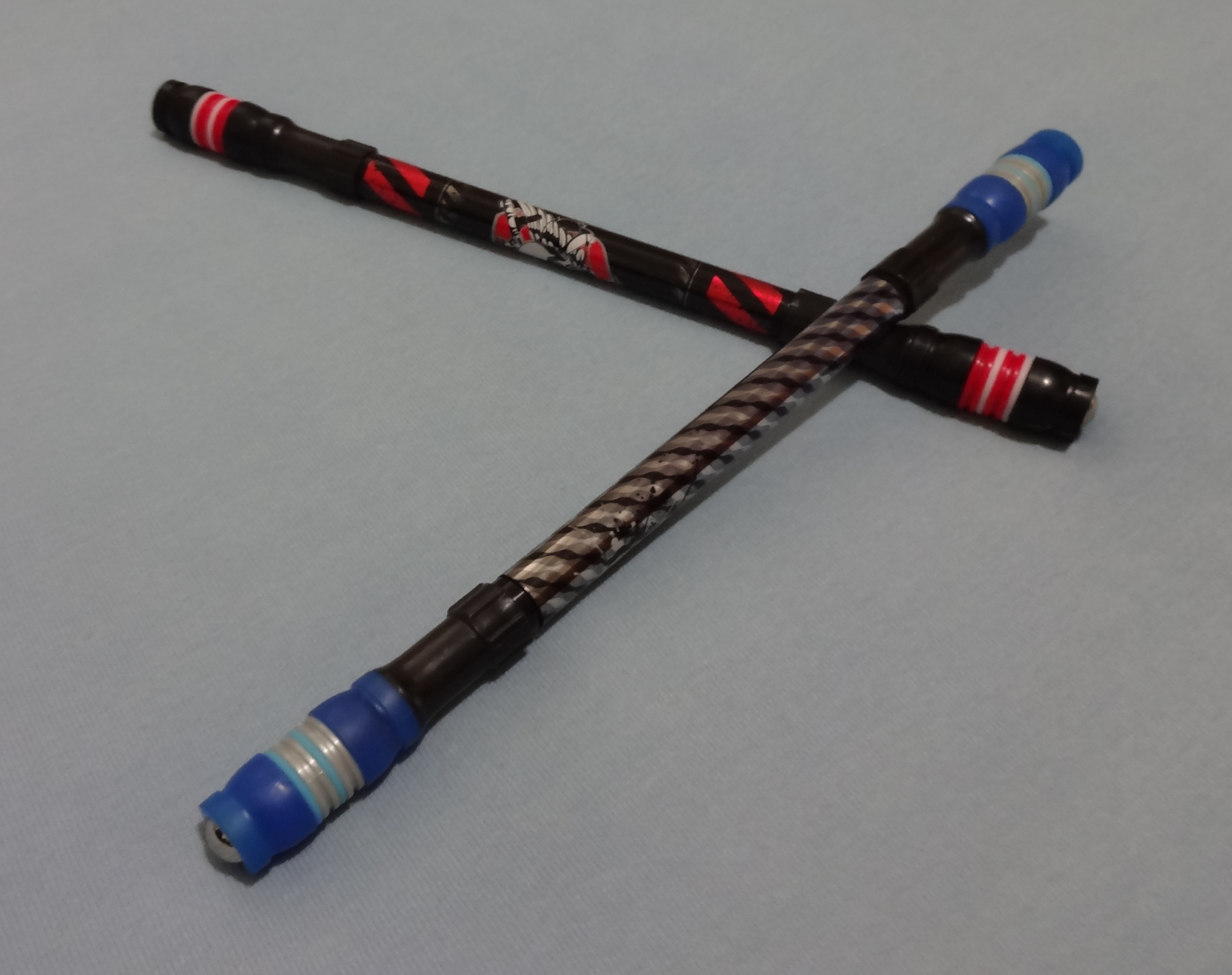 Pen modifications